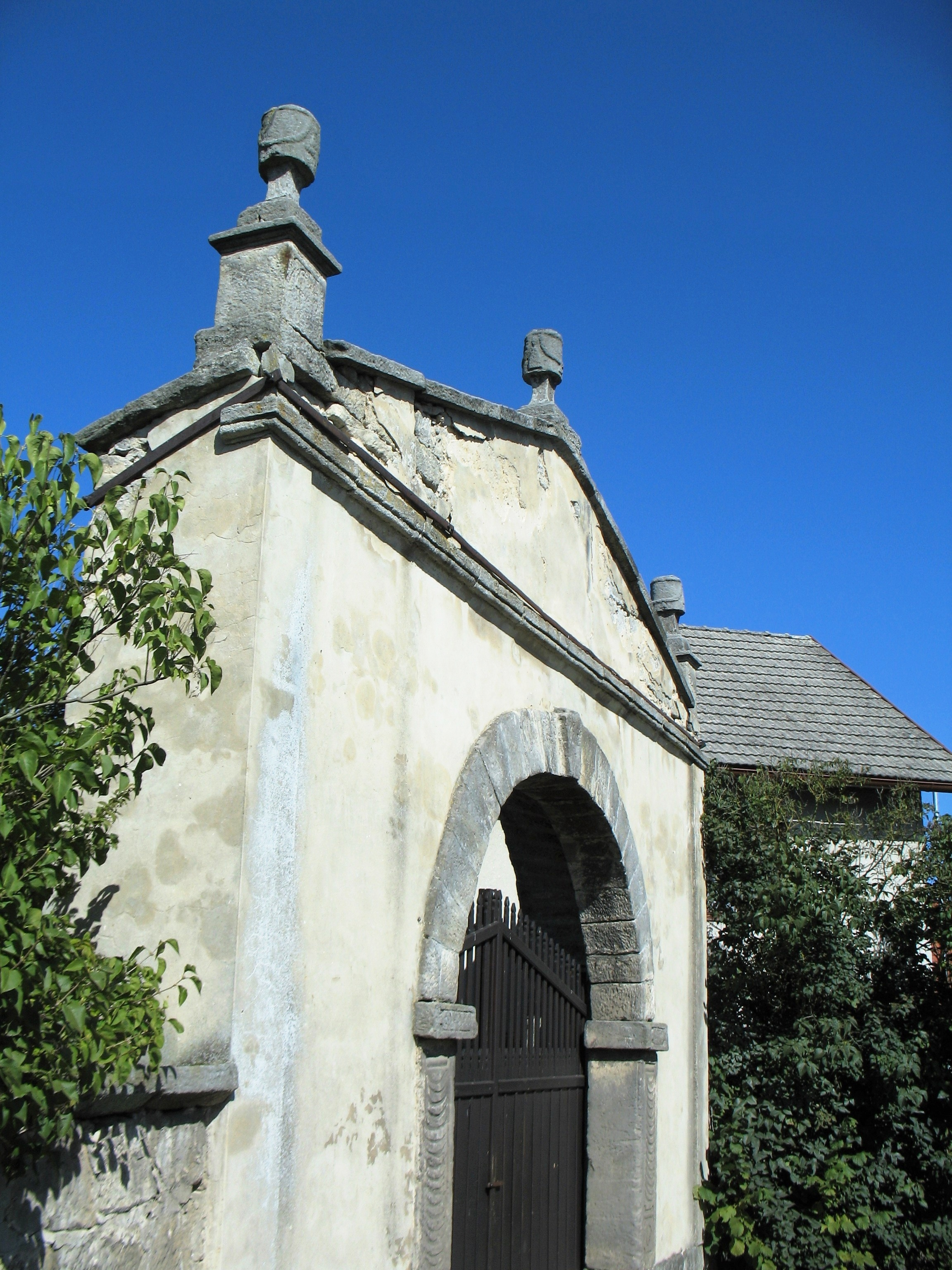 Brána usedlosti čp. 44 v Ktové, okres Semily